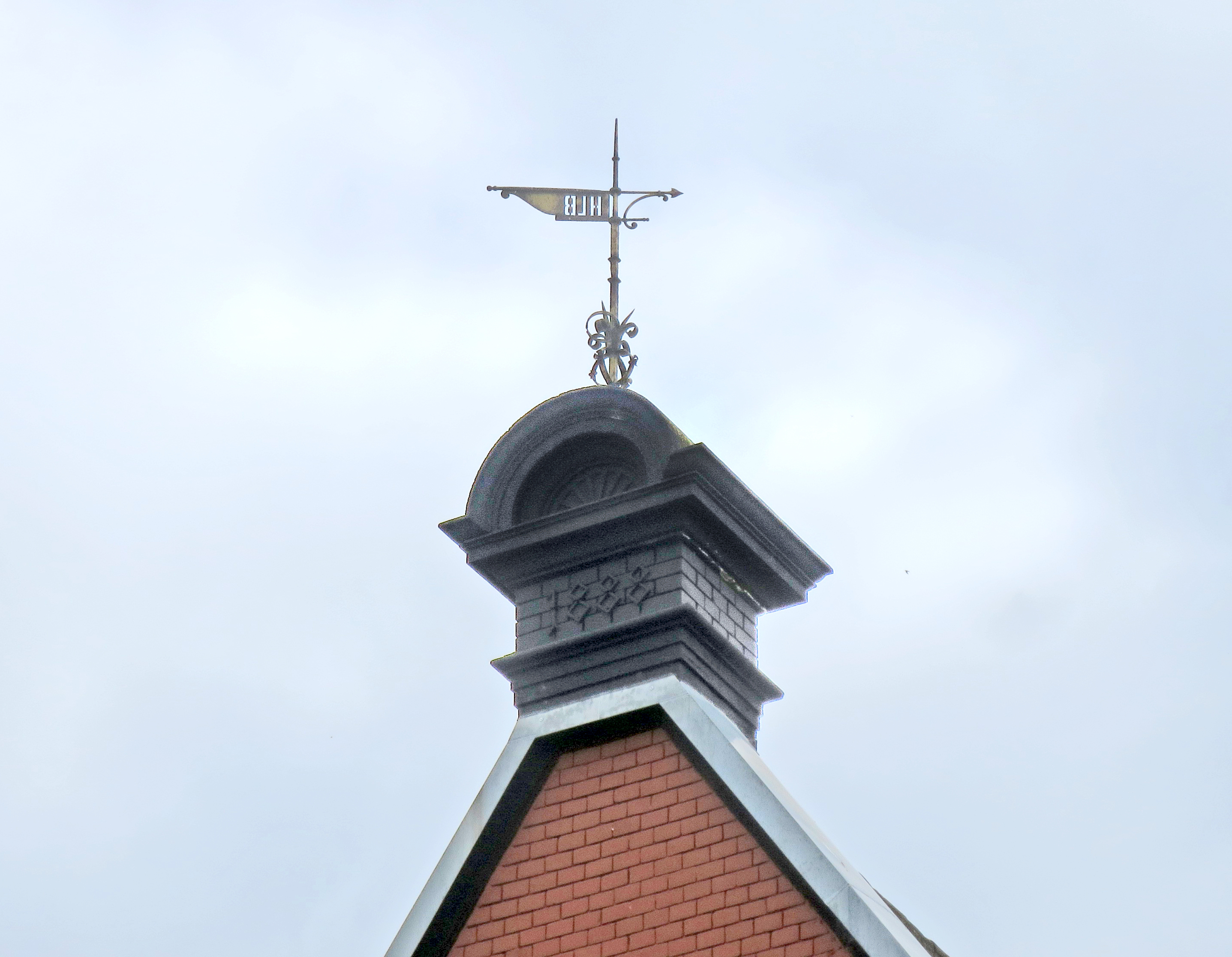 Wetterfahne auf dem Bahnhof Gustavsburg mit dem Emblem der Hessischen Ludwigsbahn